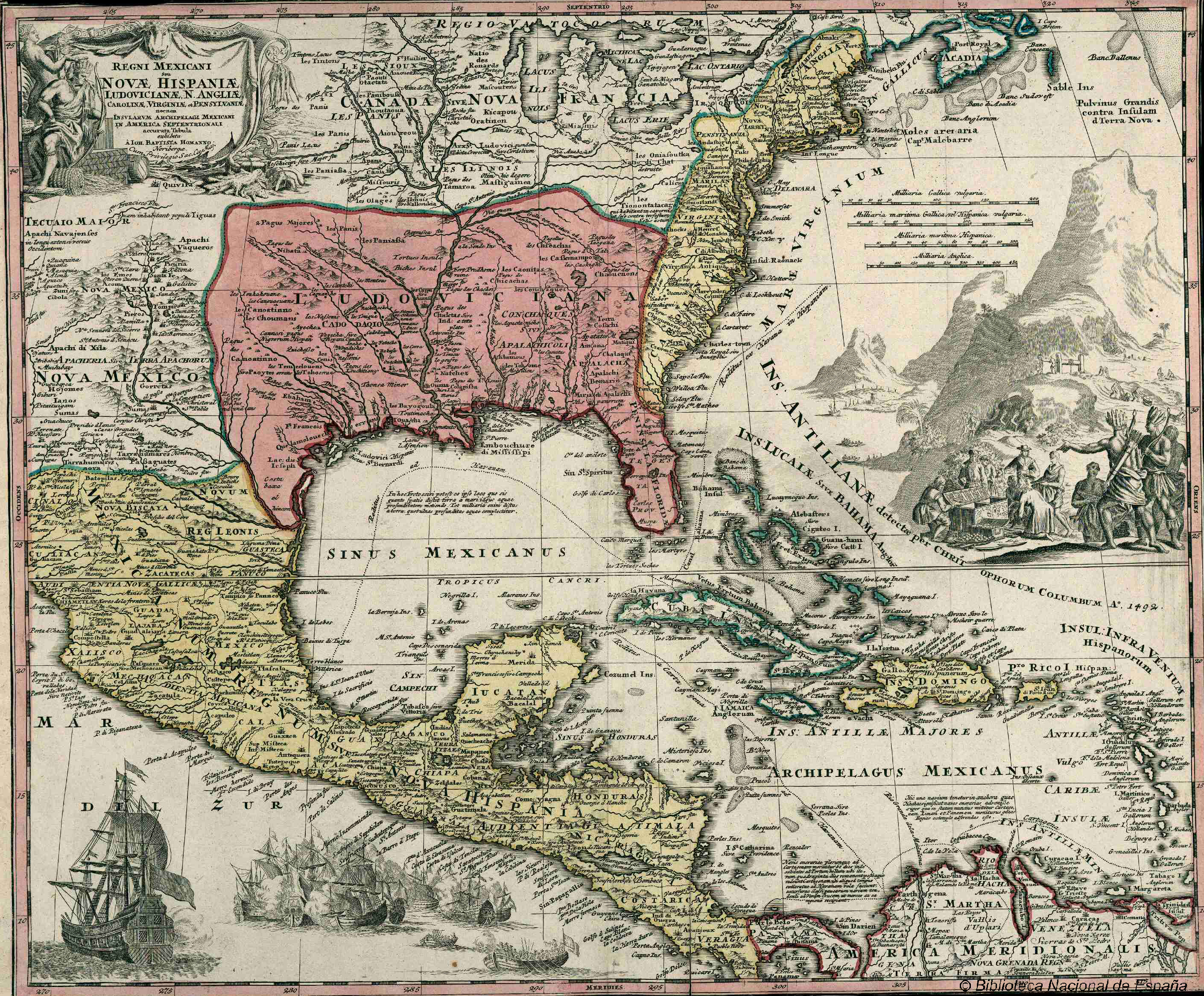 América Central. Mapas generales. 1720 Regni Mexicane seu Novae Hispanie Ludovicianae N. Angliae Carolinae Virginiae et Pensylvanie neenom insularum archipelagi Mexicani in Amerrica Septentrionali / Accurunt Tabula exibita á Ioh. Baptista Homanno. - Escala [ca. 1:11904750], 450 milliaria anglica [= 7 cm]. - [Norimbergae?, s.n., 1720?]